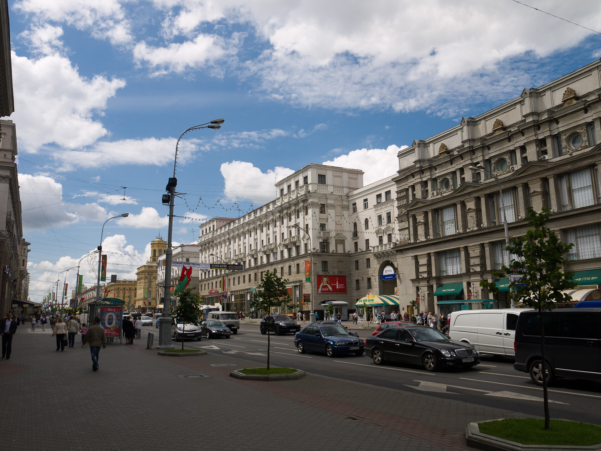 Independence Avenue in Minsk